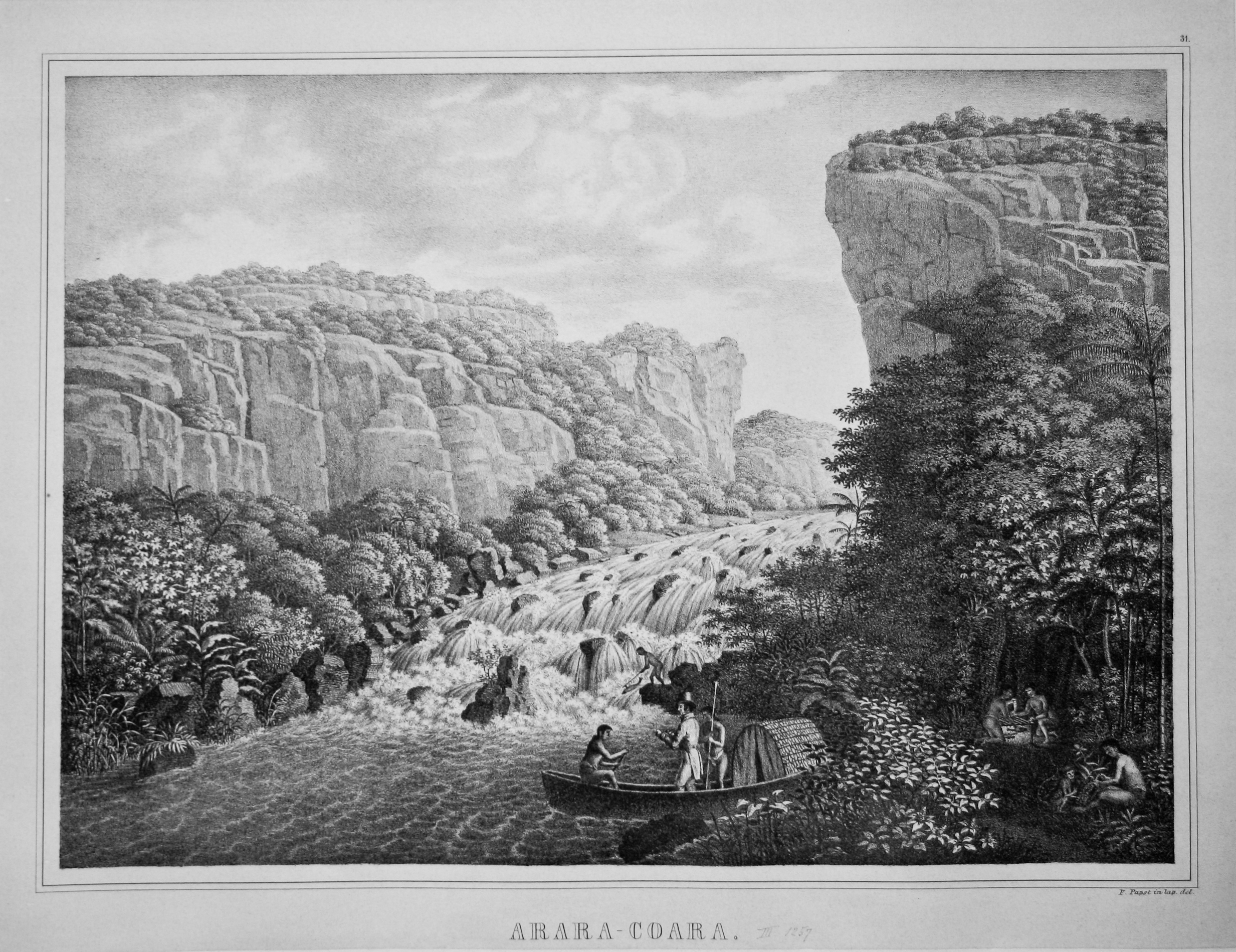 Orignial-Dateien der Digitalisierung von Spix' Reiseatlas (1823-1831 Reise in Brasilien auf Befehl Sr. Majestät Maximilian Joseph I. König von Baiern in den Jahren 1817-1820 gemacht und beschrieben - Atlas)